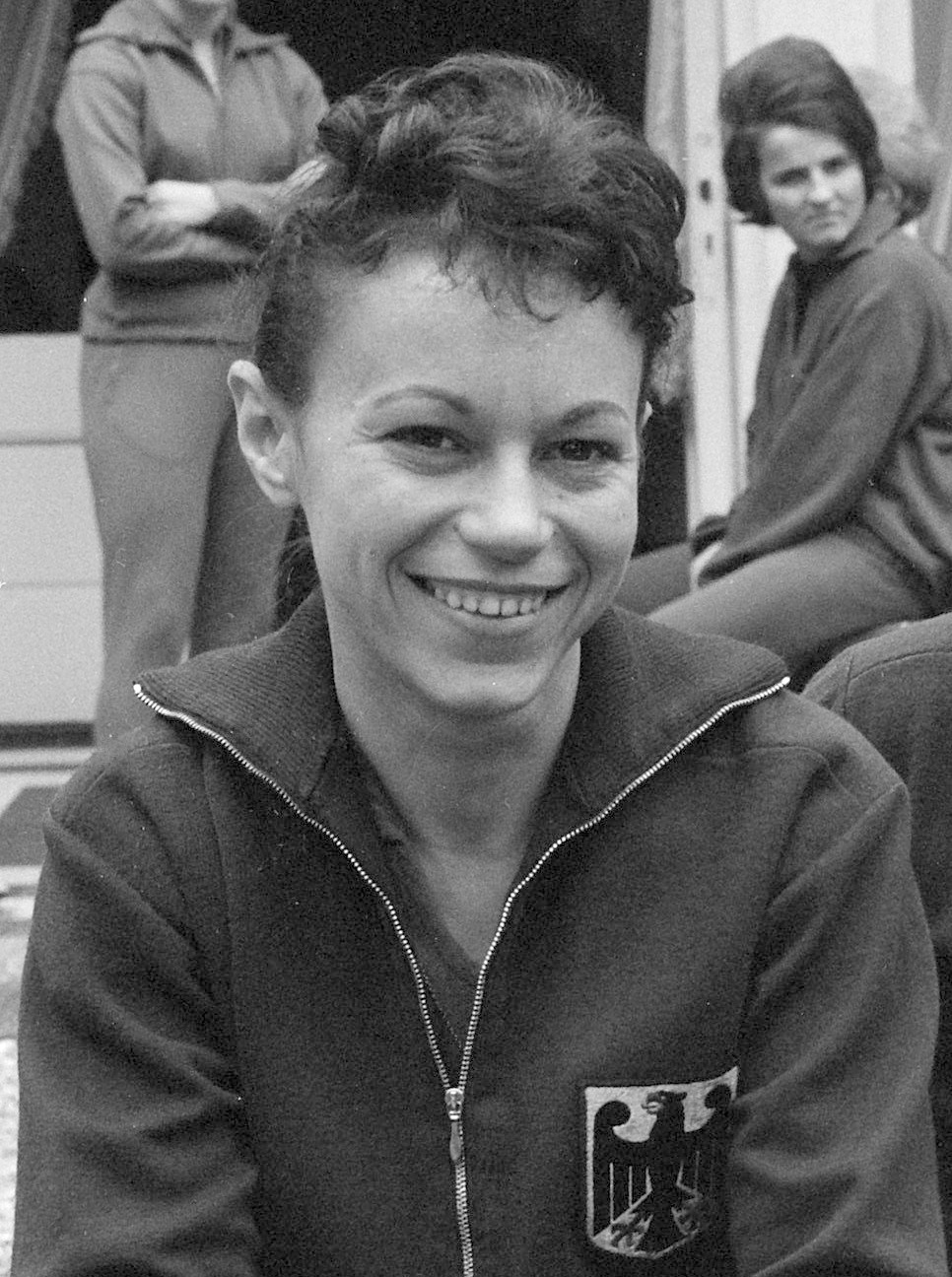 Internationale Tafeltenniskampioenschappen 1962, in Krelagehuis te Haarlem, Agnes Simon (Dld)